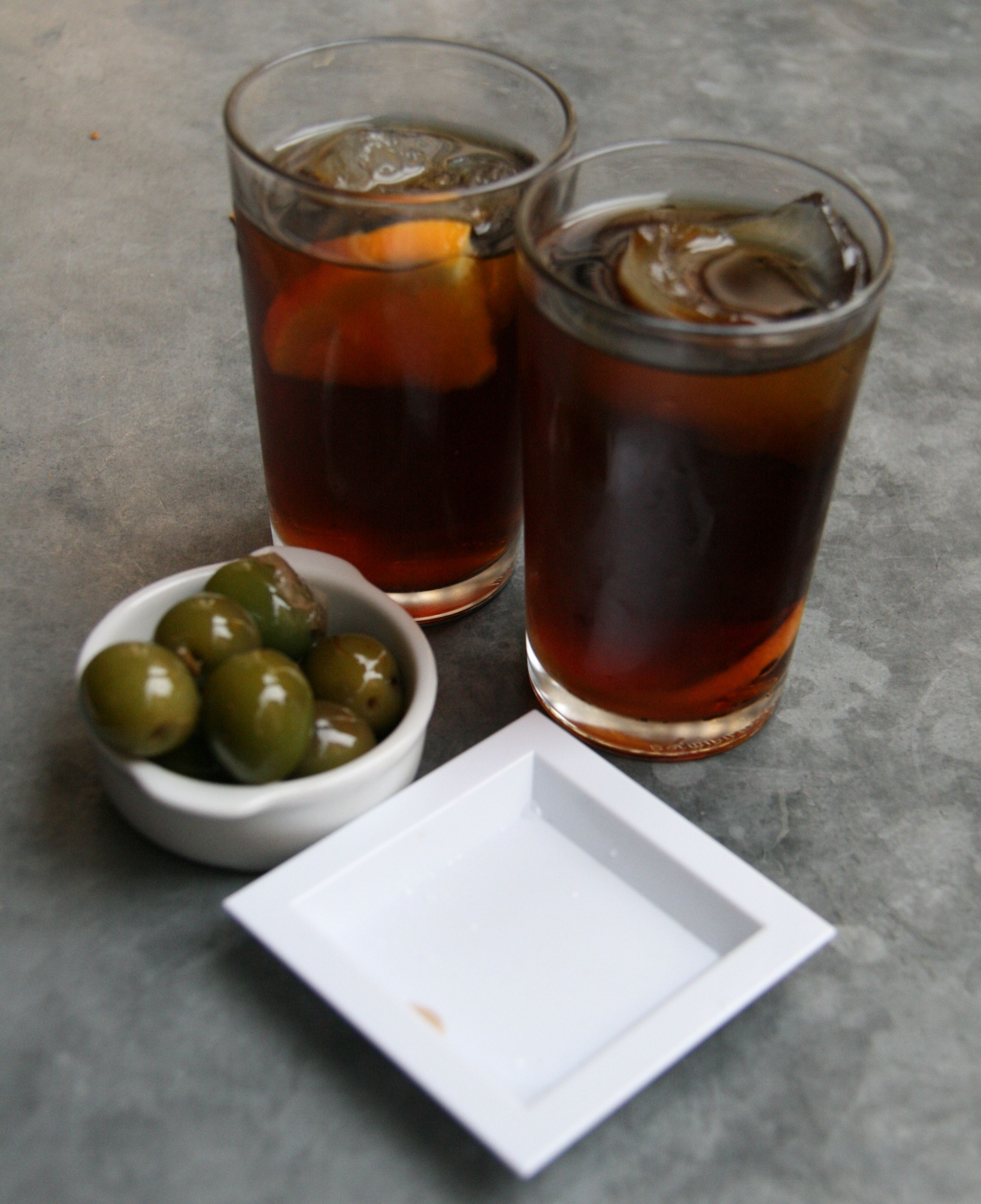 Vermouth con unas olivas